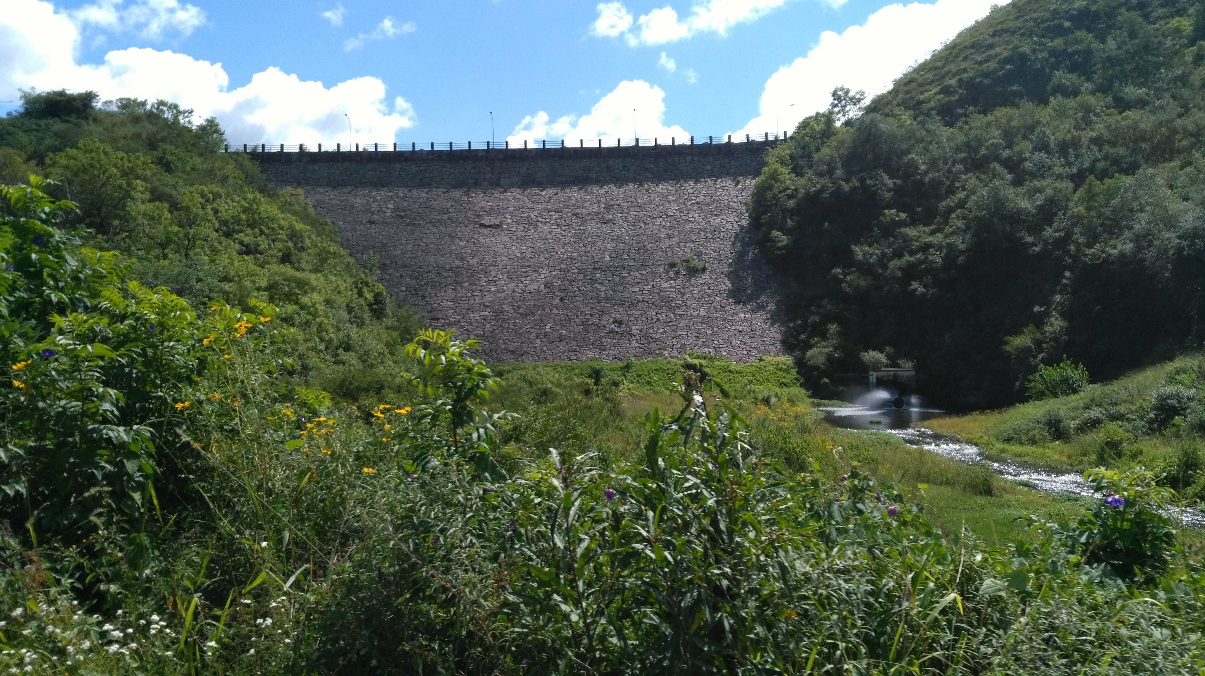 Staumauer des Stausees Campo Alegre (Dique Campo Alegre)